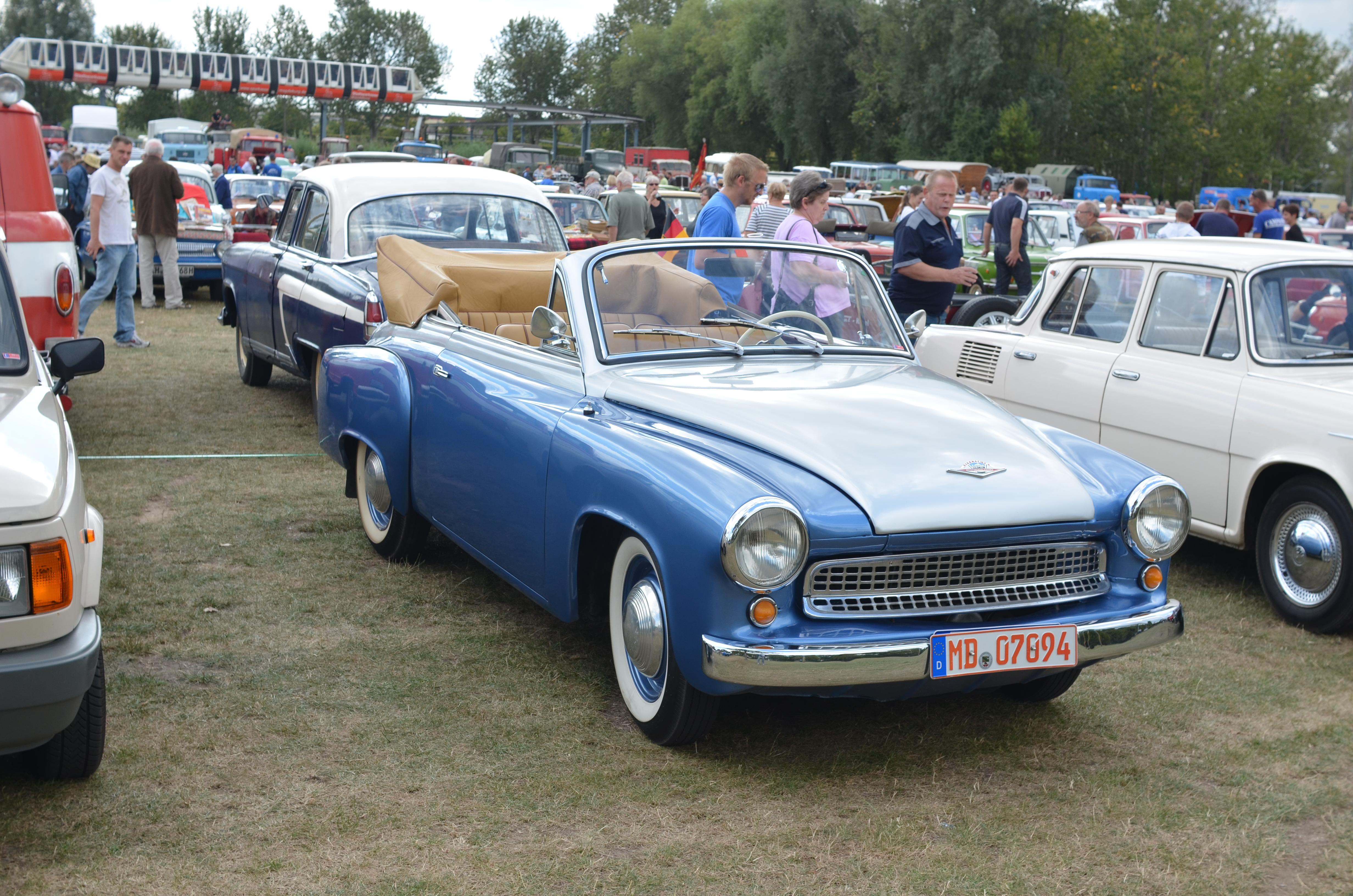 Wartburg